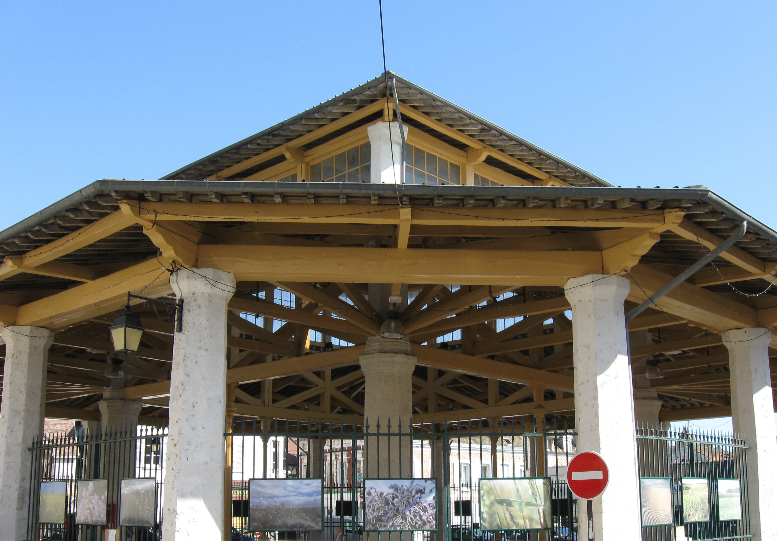 Halle de Bray-sur-Seine. (département de la Seine-et-Marne, région Île-de-France).